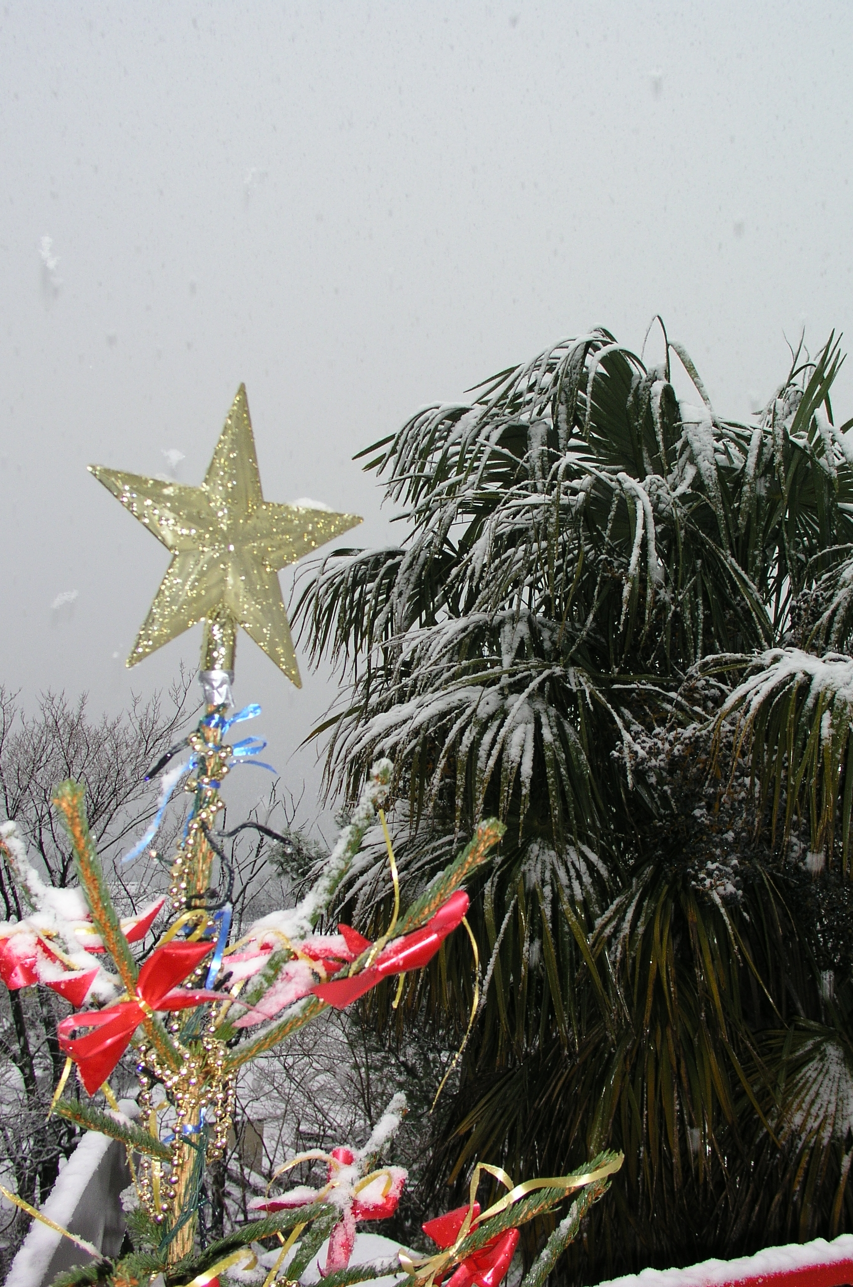 Božićno drvce